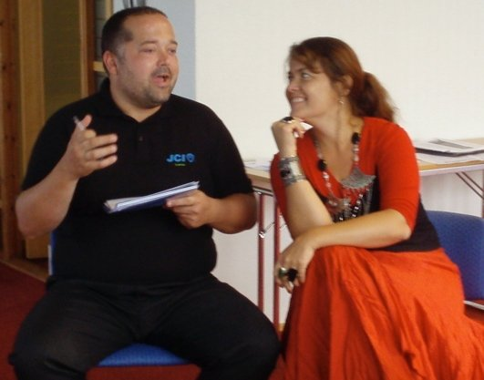 Aldis and Katrin giving the training about presentation skills in Trondheim, Norway. Training called: JCI Presenter